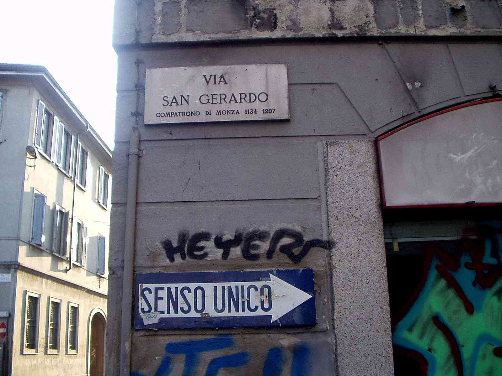 MB Monza via San Gerardo targa stradale